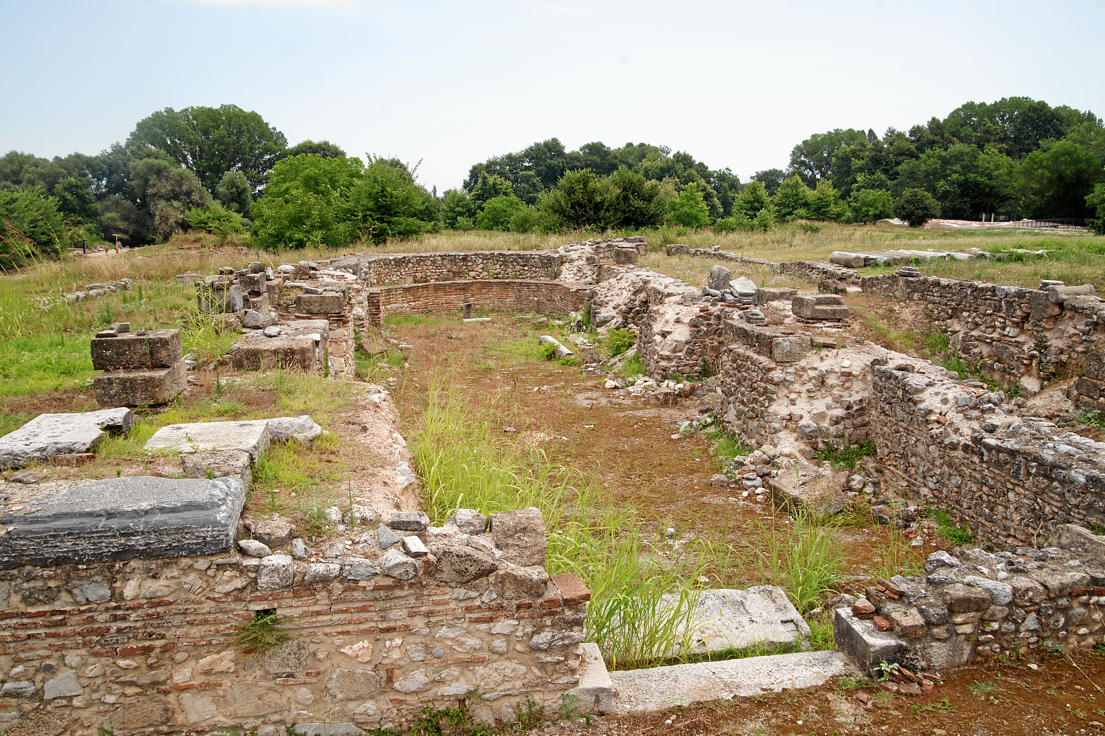 Archäolog. Park Dion: frühchristliche Basilika